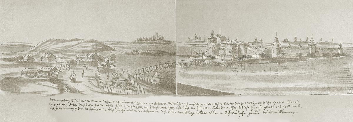 Мариенбург или Алыст